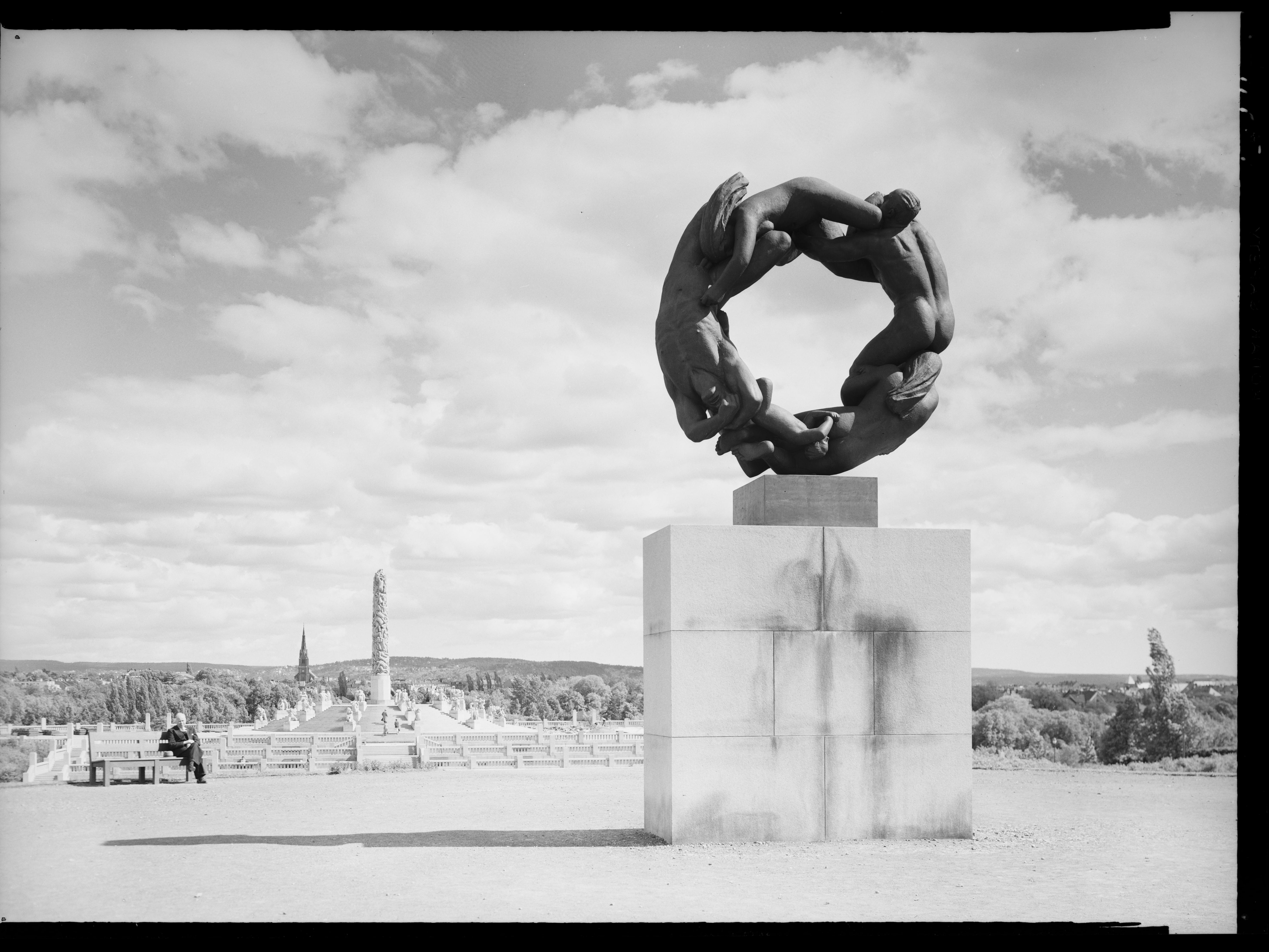 Bildet er hentet fra Nasjonalbibliotekets bildesamling. Anmerkninger til bildet var: Fotograf ukjent Oslo,Vigelandsparken, Oslo, Oslo